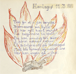 Hyttebok Hamlagrø